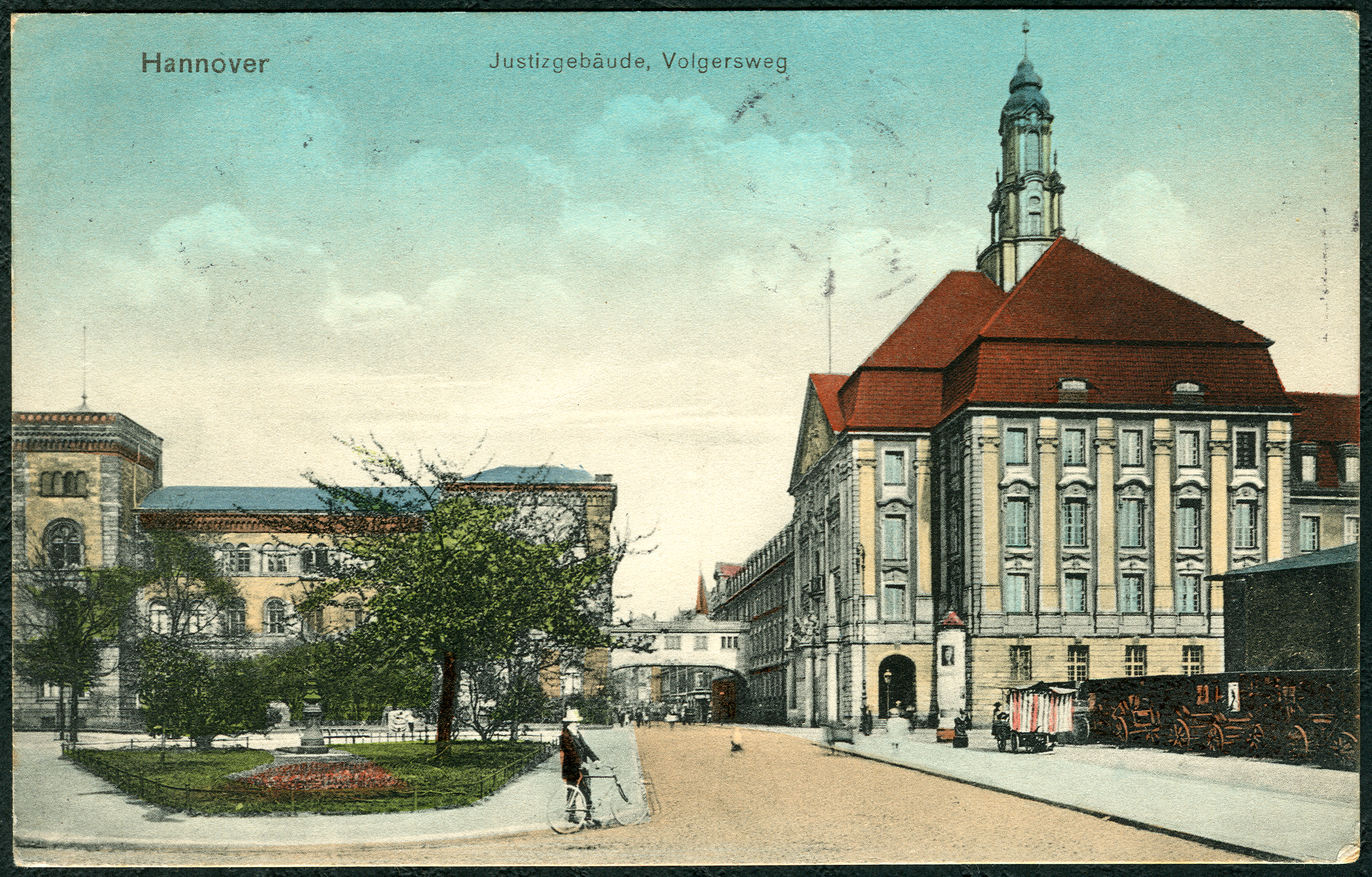 Kolorierte Ansichtskarte mit der fortlaufenden Nummerierung 17 eines noch unidentifizierten Fotografen der Norddeutschen Papier-Industrie. Standort war der Volgersweg hinter dem Hauptbahnhof in Hannover mit Blick auf die damaligen Justizgebäude, von denen sich das Gebäude des Amtsgerichtes erhalten hat. Links im Bild hinter der Grünfläche ist der während der späteren Luftangriffe auf Hannover zerstörte Bau des (heutigen) Landgerichts zu sehen, während die Bauten rechts im Bild mit den hintereinander gereihten Fuhrwerken noch der aus der Zeit der Maschinenfabrik A. Knoevenagel stammen ...